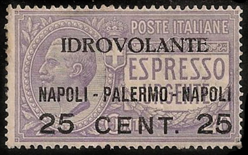 Вторая авиапочтовая марка Италии, 1917